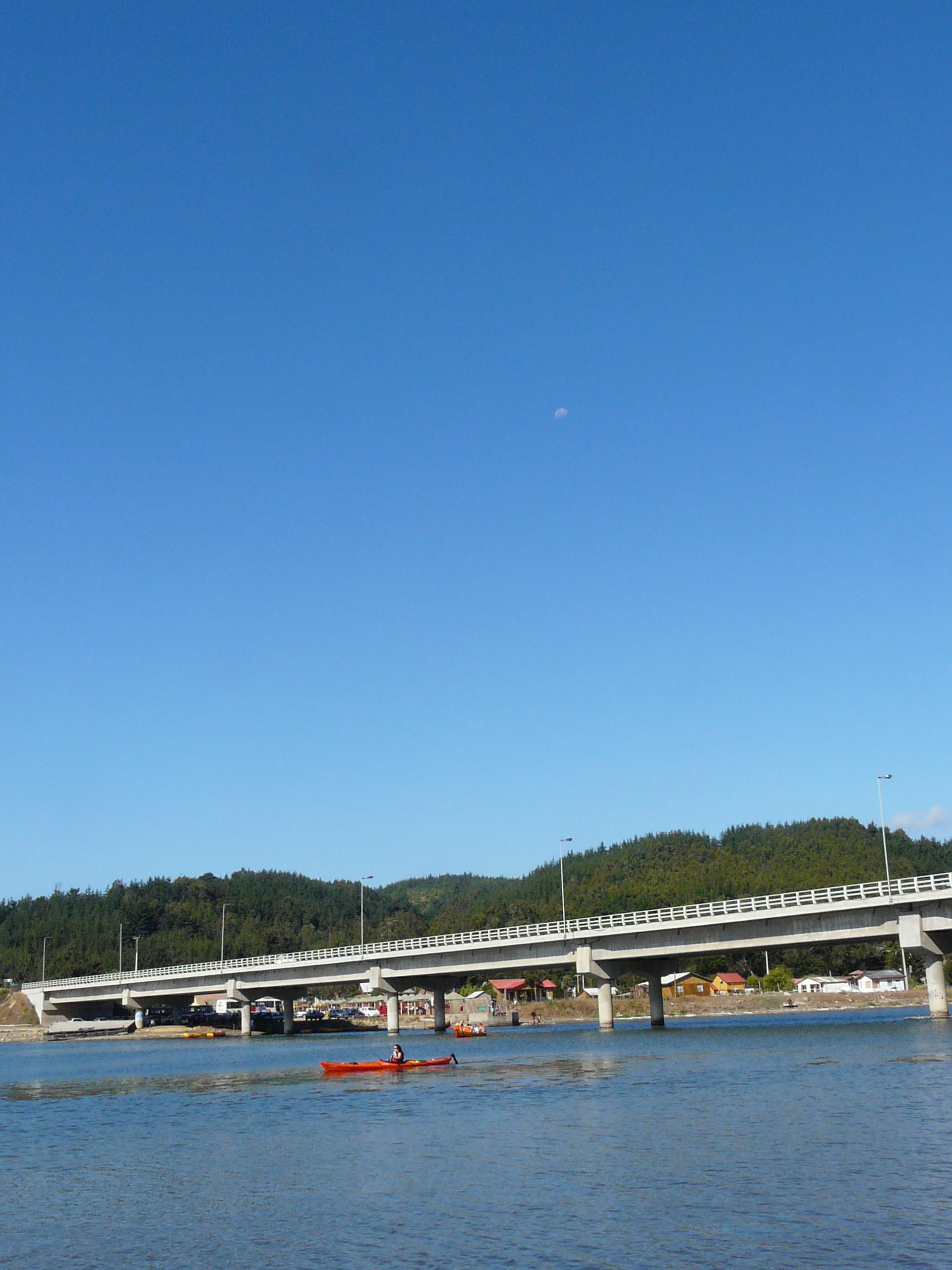 Pichilemu_DIC_08 028